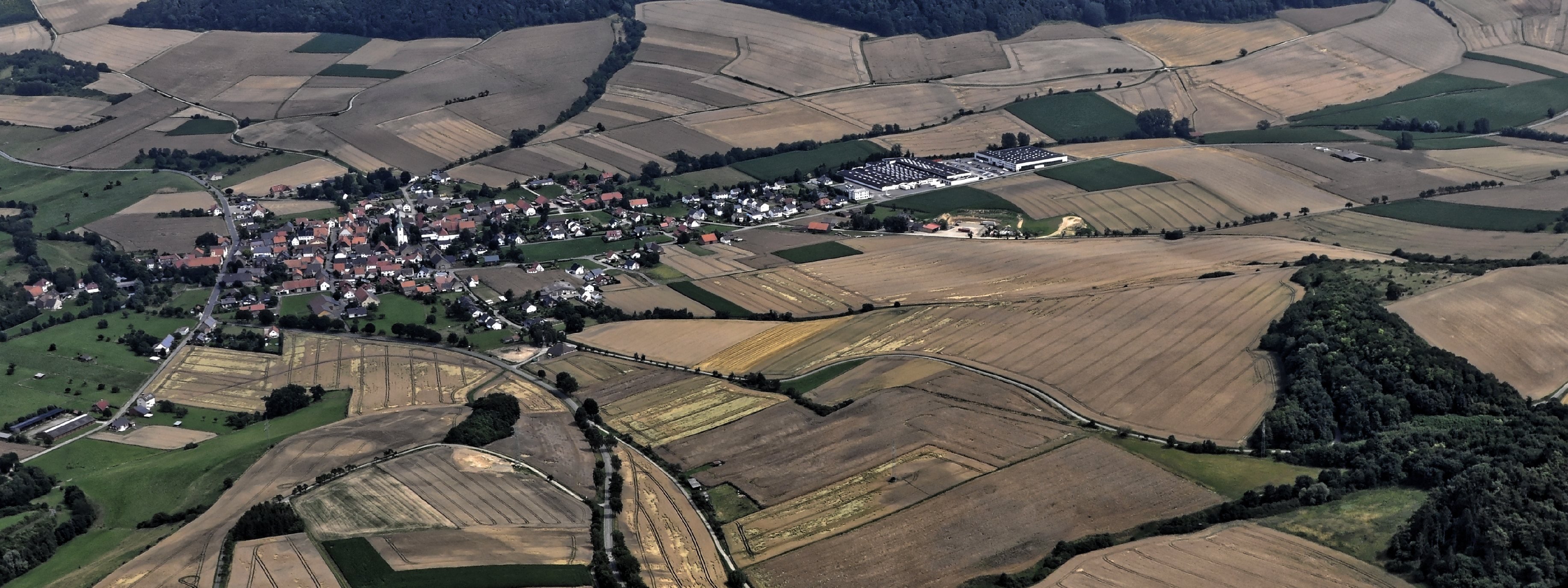 Bilder vom Flug Nordholz-Hammelburg 2015: Brakel-Erkeln